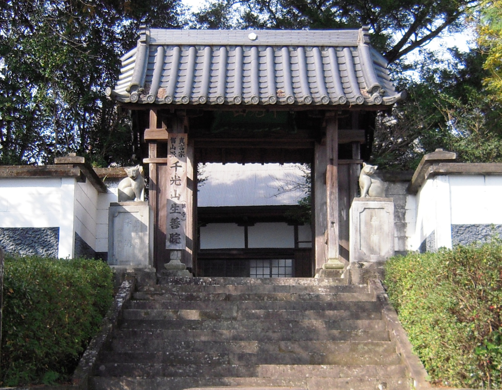 熊本県水上村にある生善院の山門。寺は猫寺と呼ばれ、門前には狛犬ならぬ「狛猫」が見える。